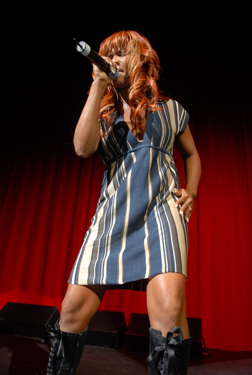 Lady Saw